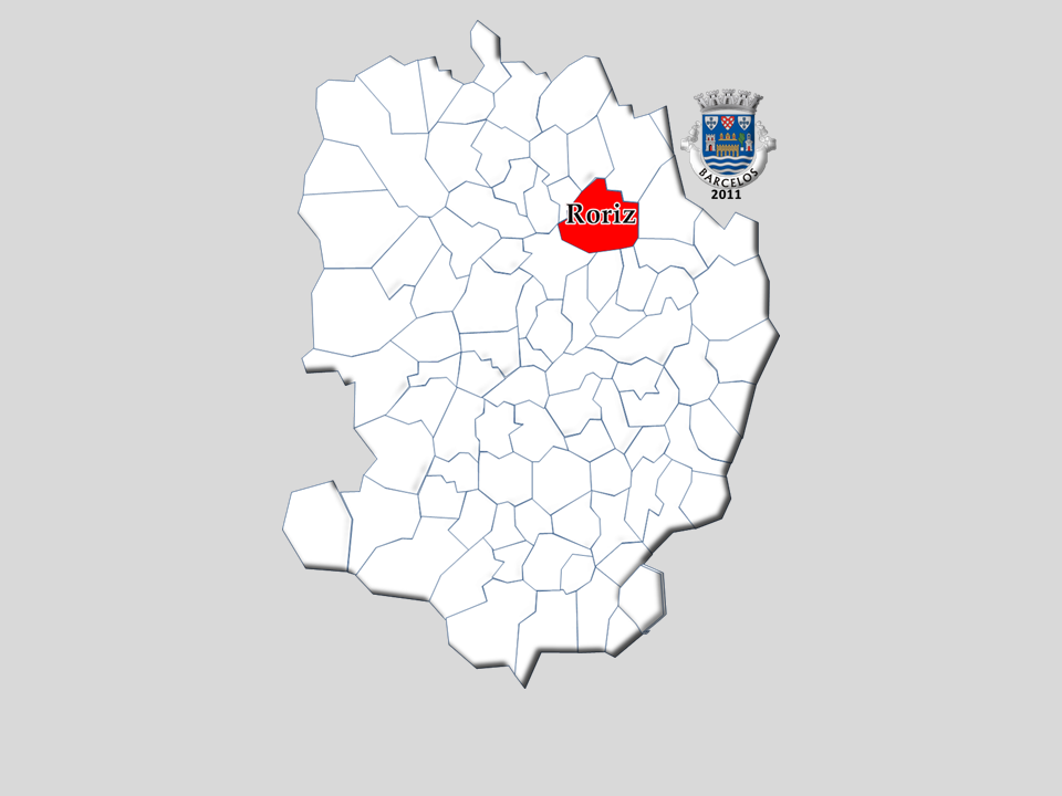 Censos 1864/2011